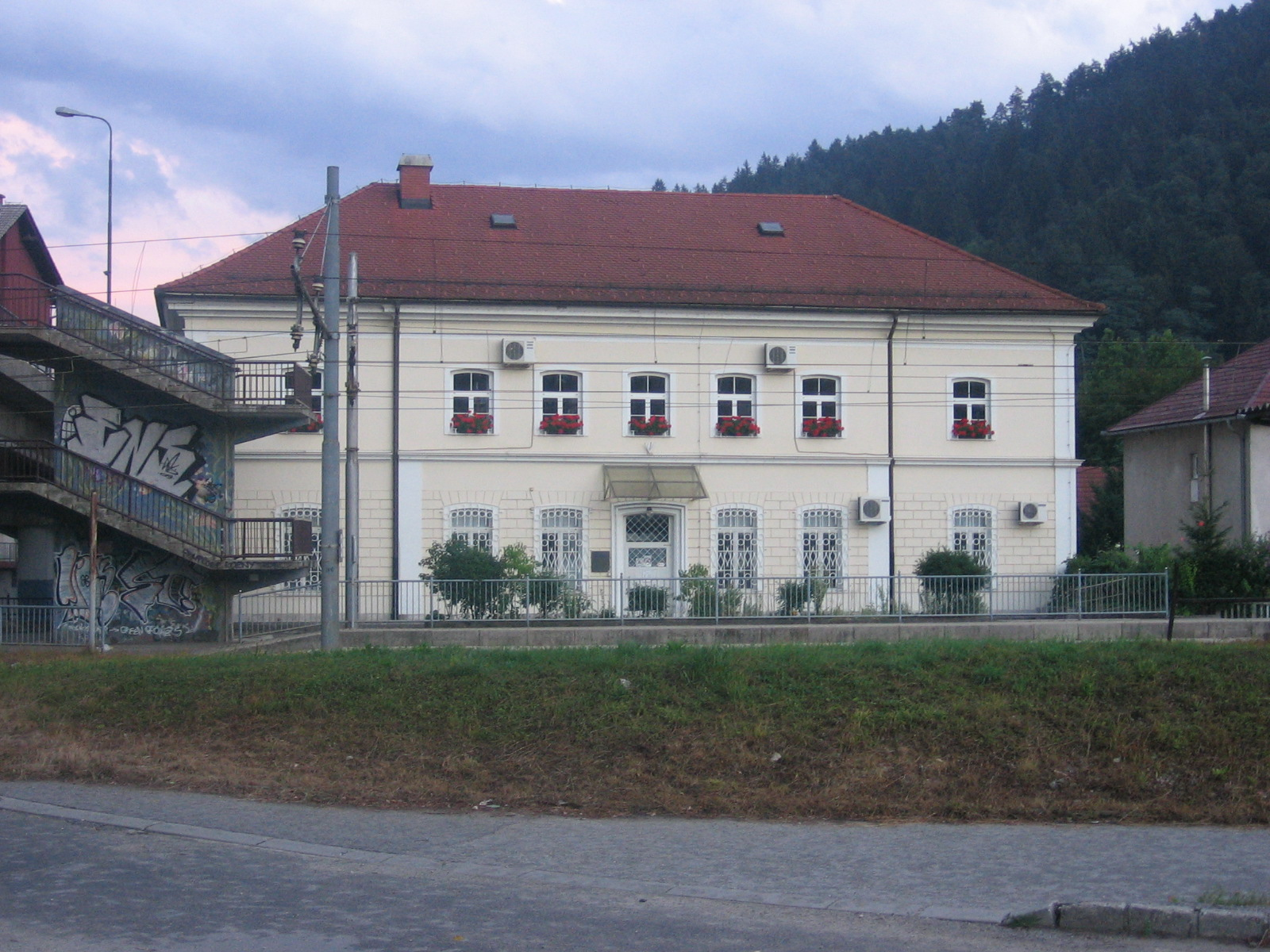 Litija library